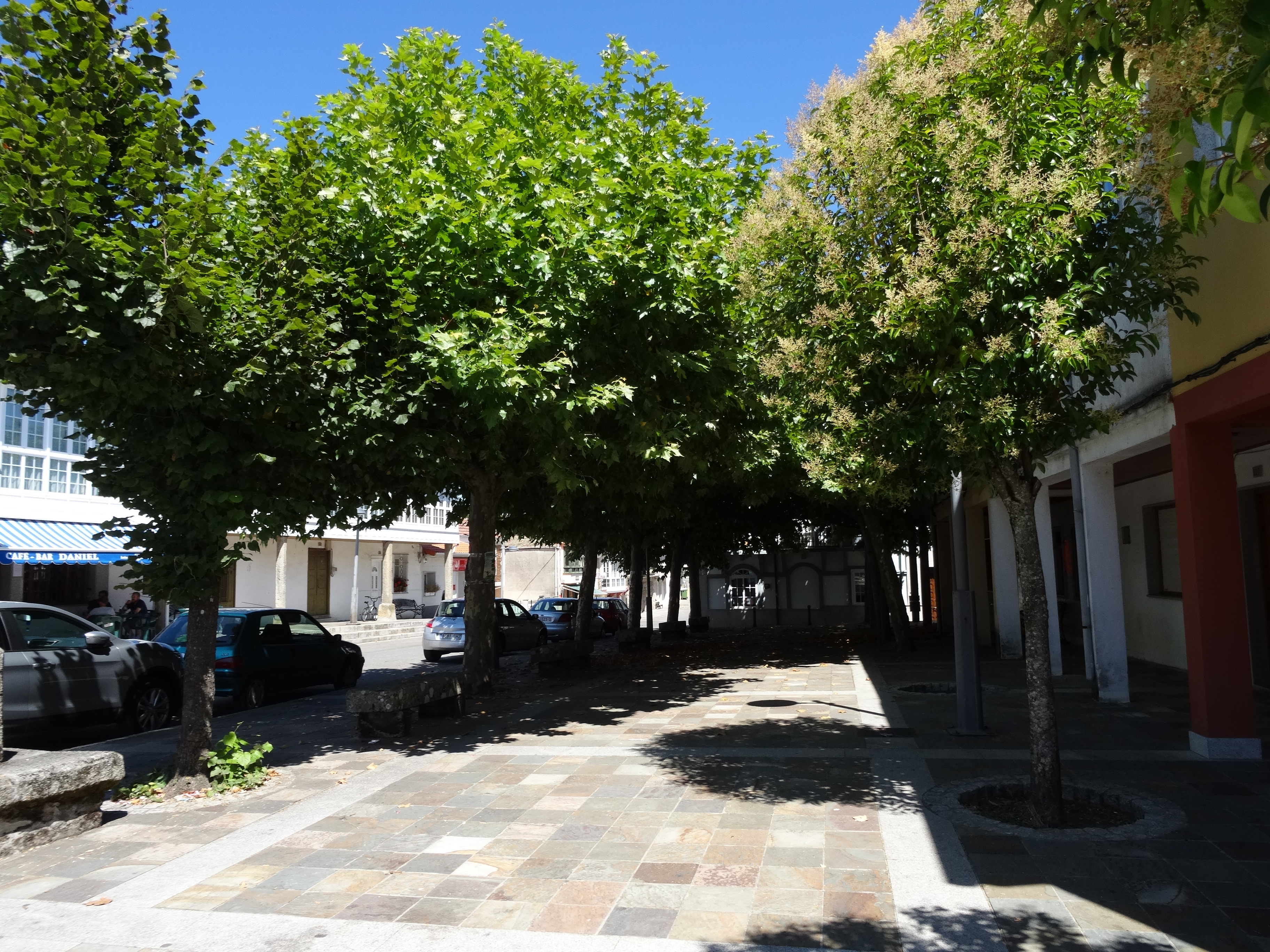 Praza do concello, Riós, Ourense.